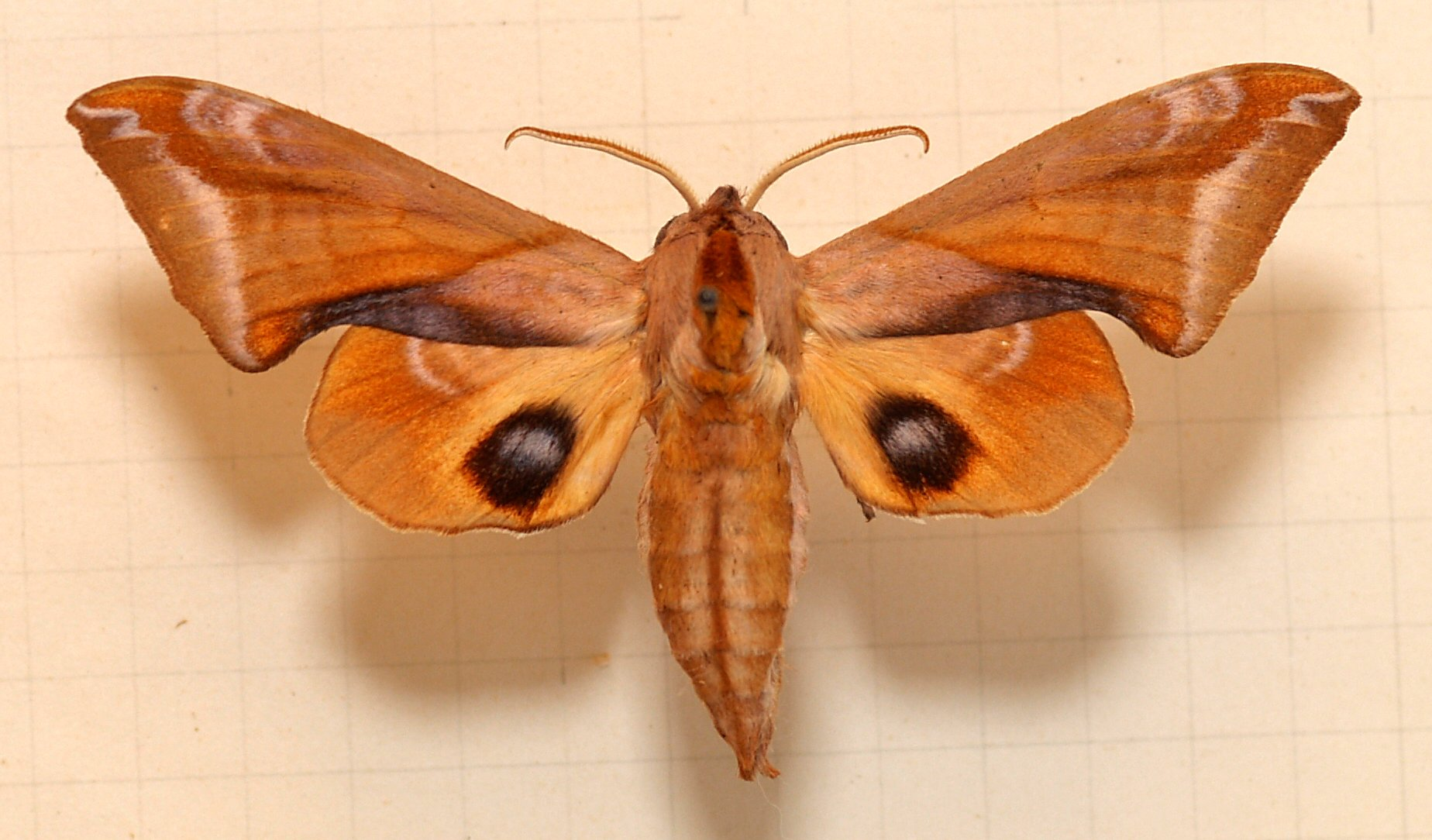 Paonias astylus